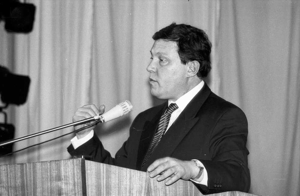 18 февраля 1997 года в культурном центре "Славич" выступил Григорий Алексеевич Явлинский. В президиуме были Елена Борисовна Мизулина, Евгений Алексеевич Мельник, Иван Филиппович Анюховский. На снимке: выступает Григорий Алексеевич Явлинский.